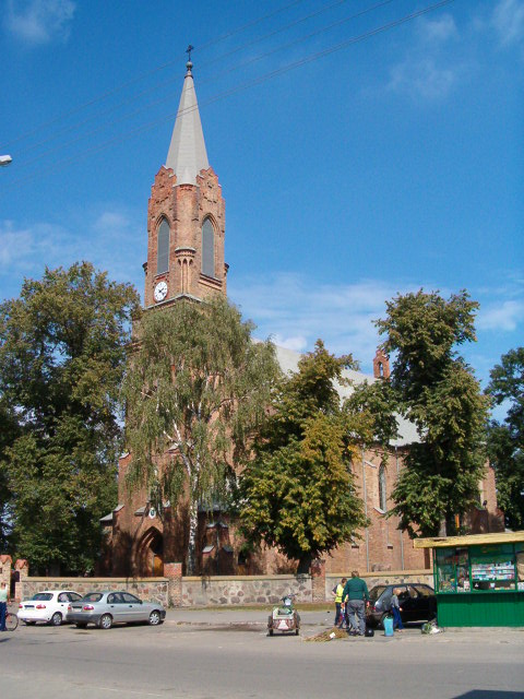 Kościół przy rynku w Sochocinie removed from pl.wiki